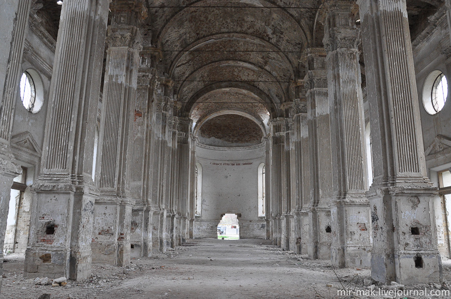 Начиная с 1821 года в поселении действовала католическая церковь. В 1901 году на месте церкви был трехнефный собор, имевший две башни высотой 57,9 метров. В отличие от большинства церквей Одесского региона, которые строились исключительно из известняка, Успенский собор в зельце был построен полностью из кирпича. Общие расходы на развитие костела составили в то время 110000 рублей. Собор был построен в стиле неоренессанс, имел три нефа, две башни. Прототипом для собора служил собор Зальцбурге, Австрия. Новый храм отличался богатым внутренним убранством. В 1901 году здесь размещают заказанный в Австрииризний алтарь, в 1903 году - построена кафедра, а в 1904 году - придел. В 1906 году в соборе установлены деревянные статуи Св. Антония и распятого Христа. На стенах были изображены картины с библейскими мотивами. Сейчас костел находится в руинах. Предложение по восстановлению храма поступила от католической общины южной Германии. Условием восстановления было сохранение конфессиональной принадлежности - храм должен был принадлежать Католической церкви. По приблизительным расчетам его восстановления обойдется не менее чем в 6 млн долларов.